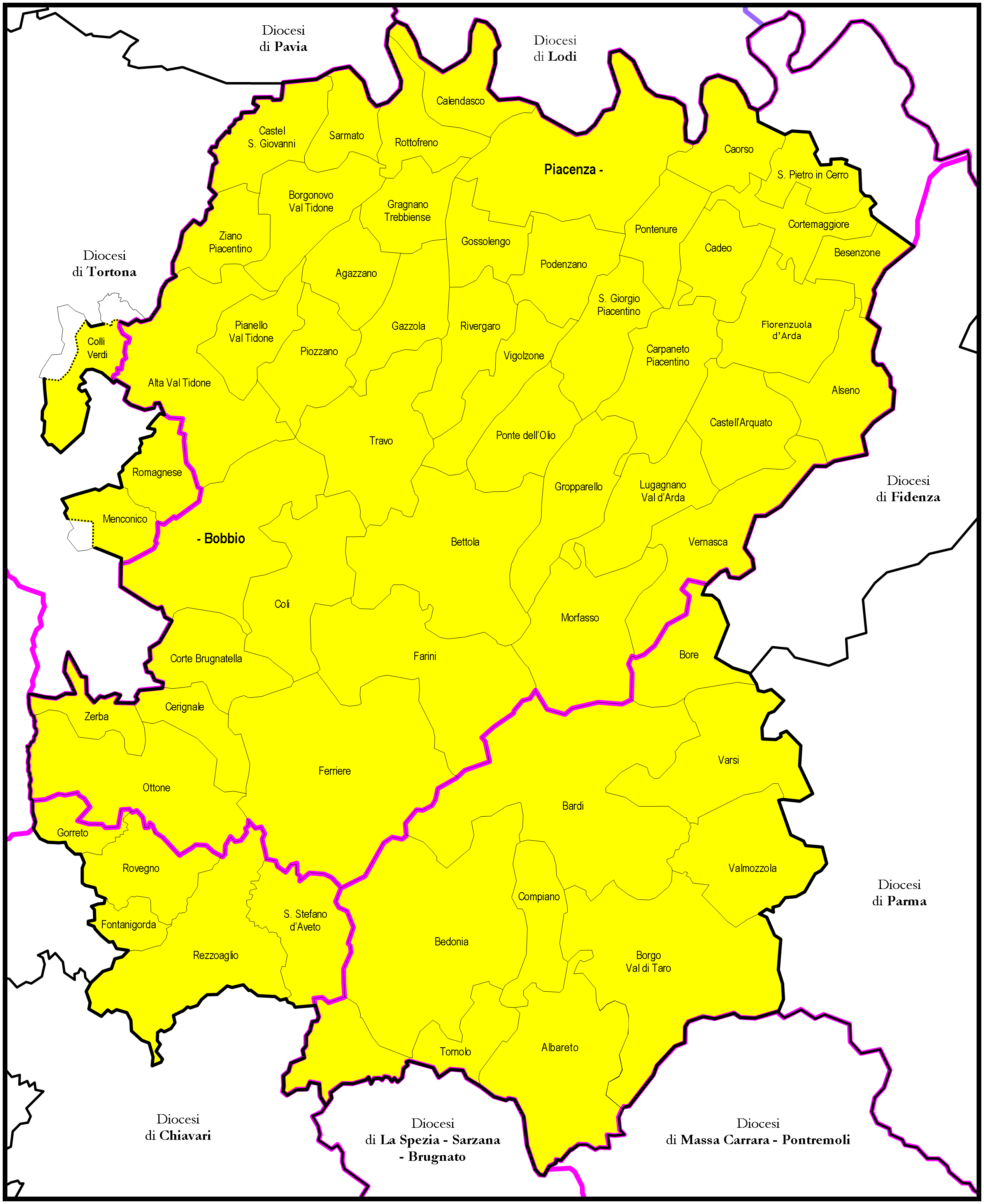 Mappa della Diocesi di Piacenza Bobbio